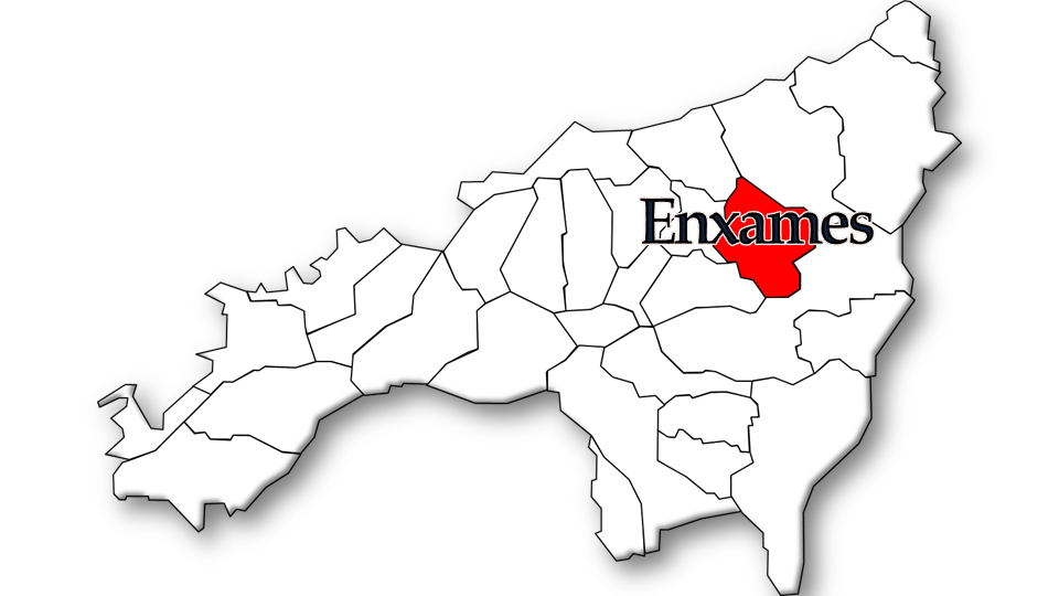 População